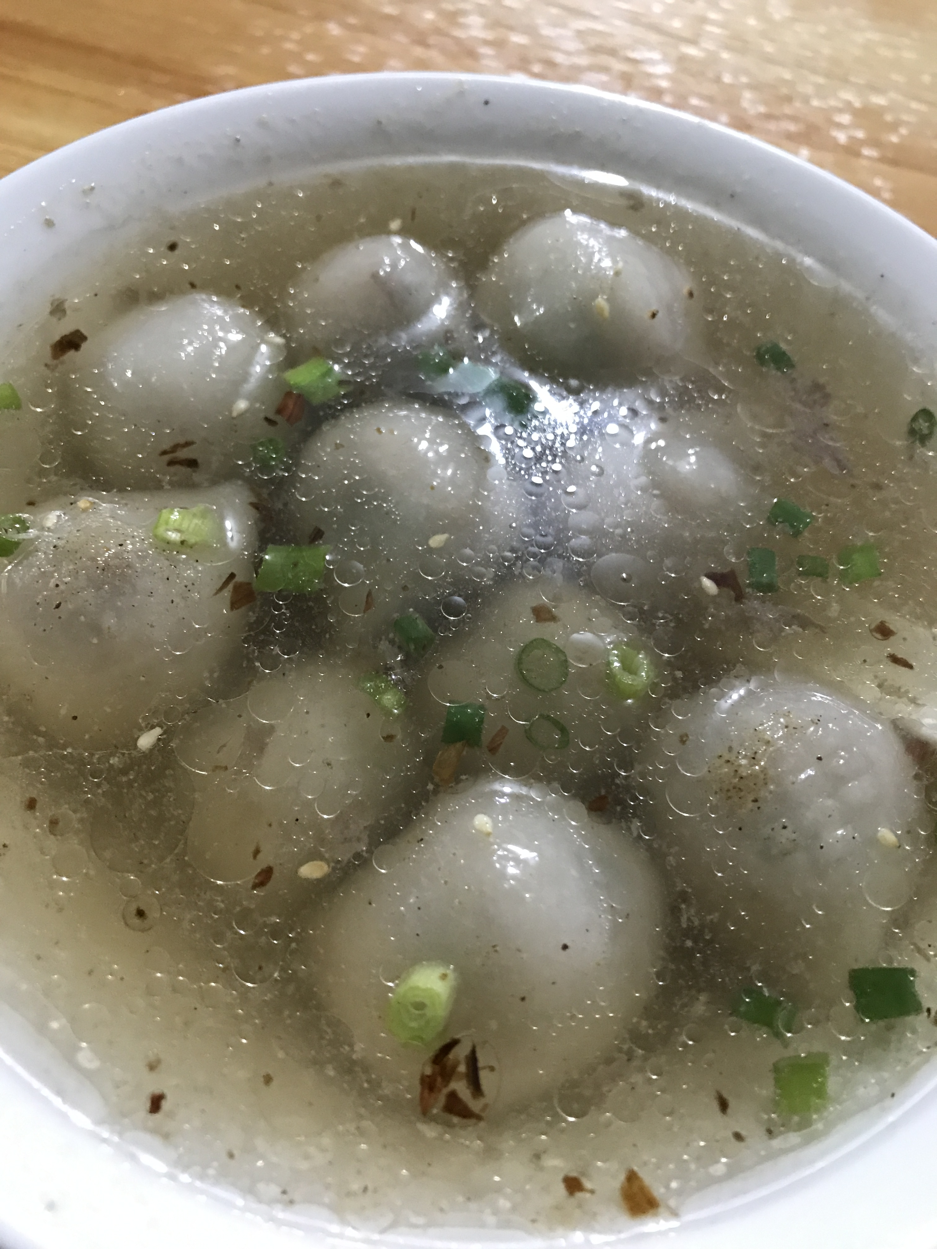 中文（中国大陆）: 一碗芋圆